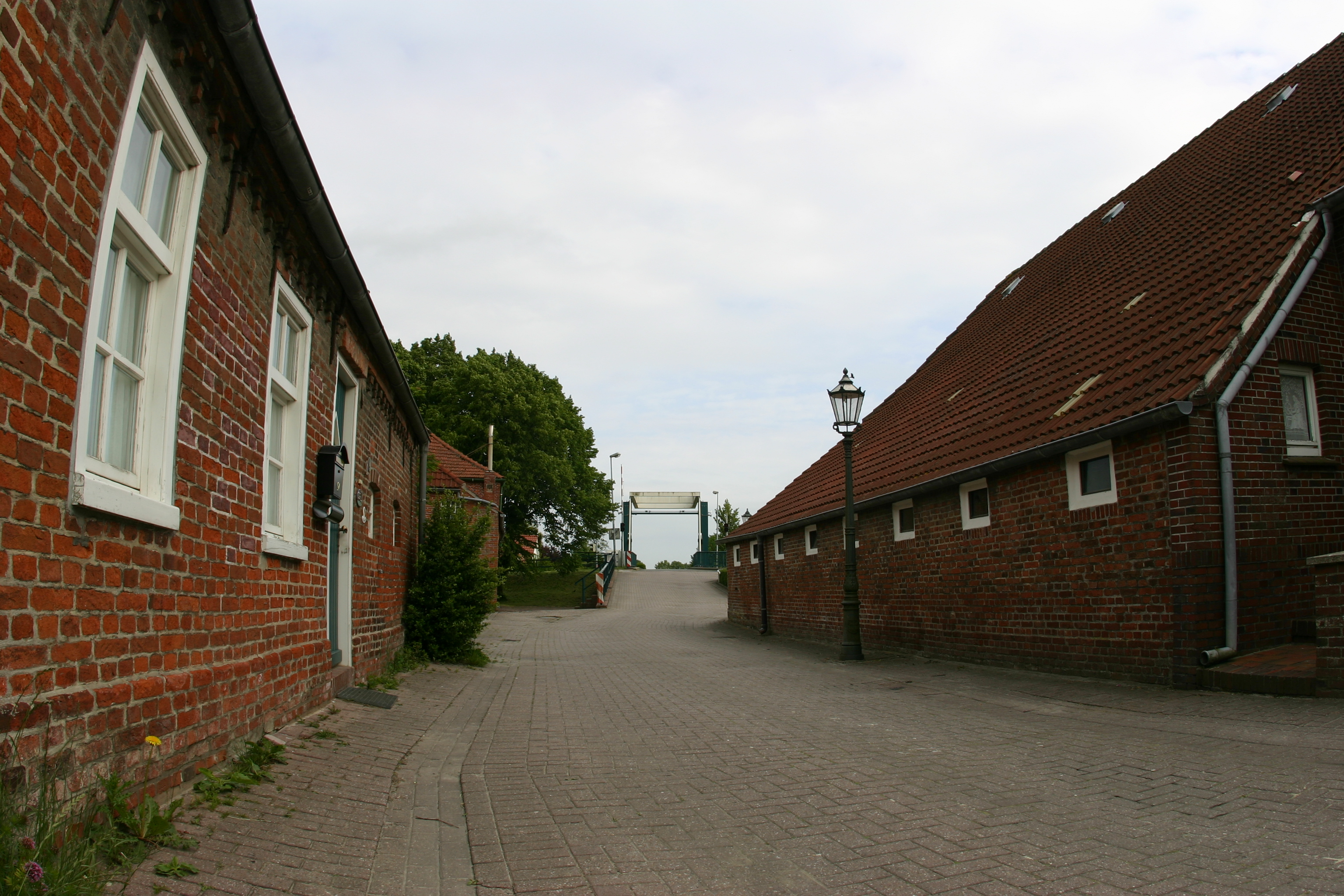 Dorfkern von Emden-Uphusen, Blick auf die Brücke über den Ems-Jade-Kanal